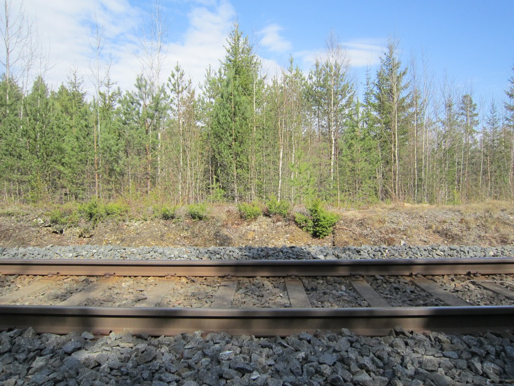 Hasle holdeplass på Solørbanen